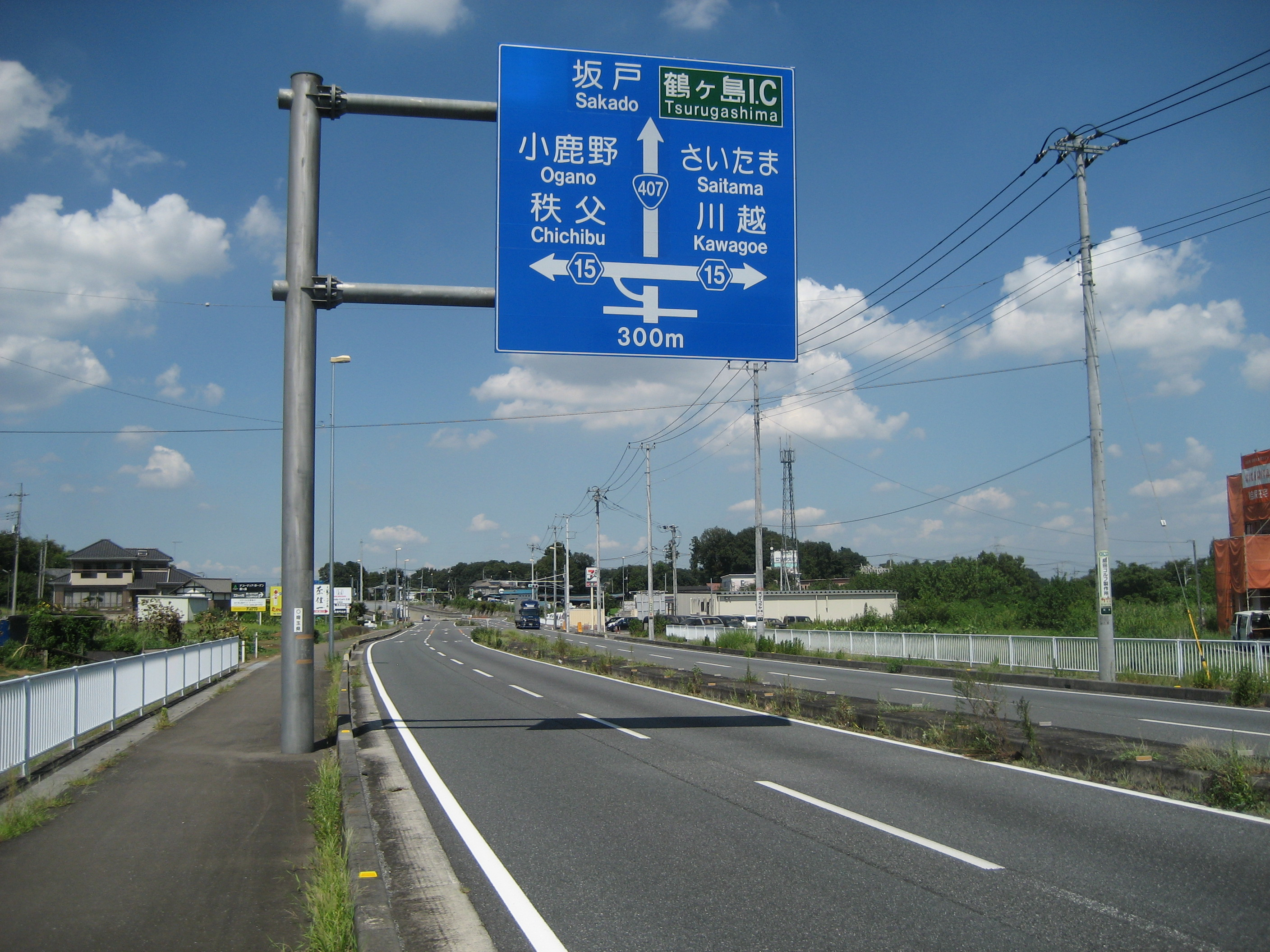 国道407号線日高バイパス埼玉県日高市高萩付近